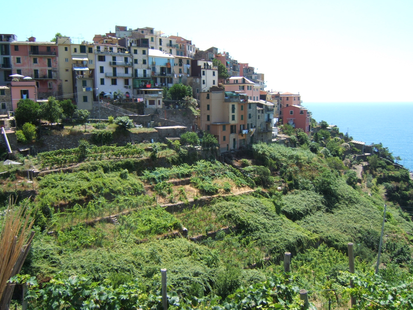 Corniglia